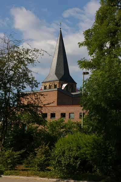 Sankt Martin aus Sicht Martinschule